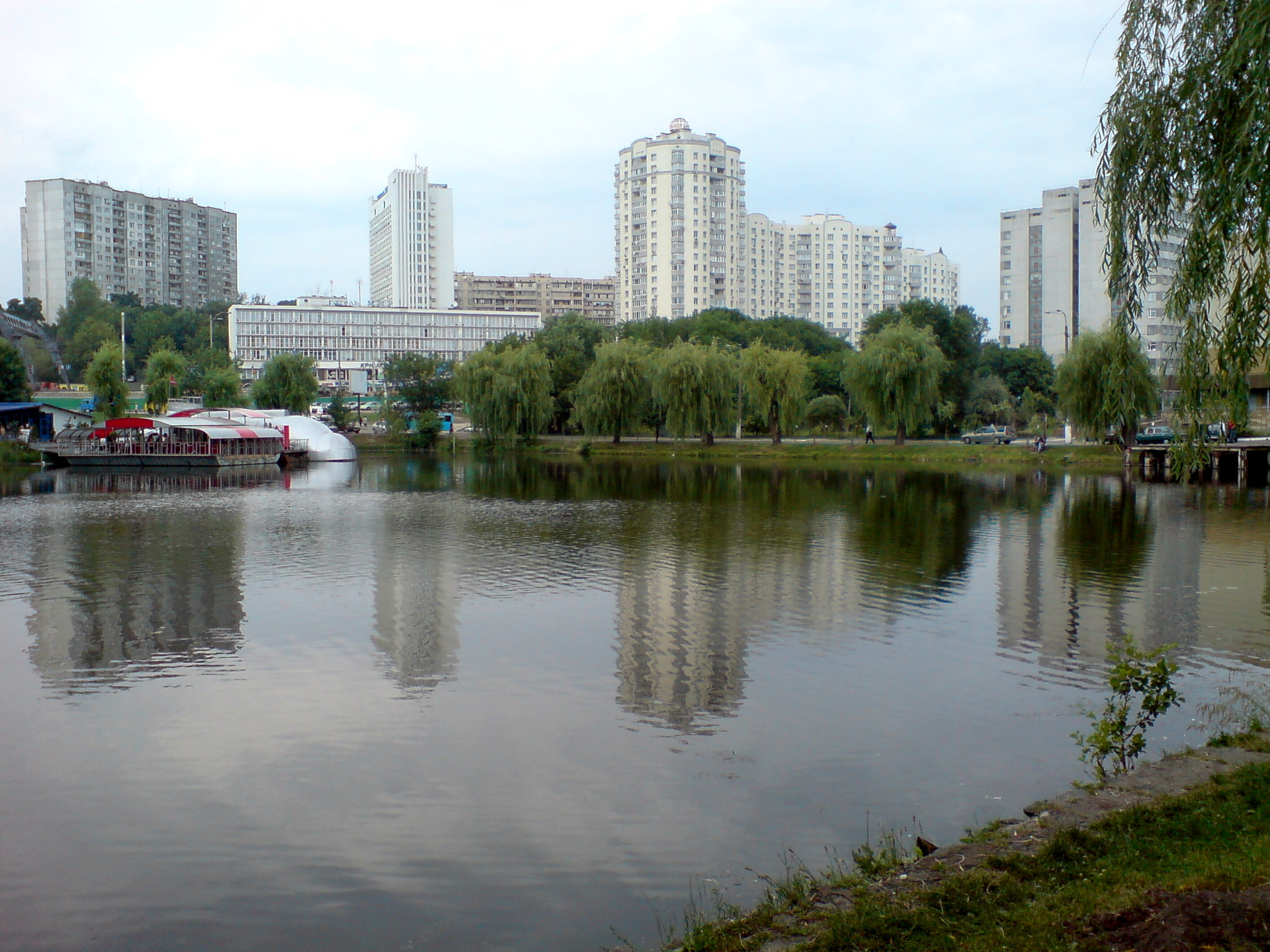 Kiev - Rylsky Park lake near Golosiivska Square